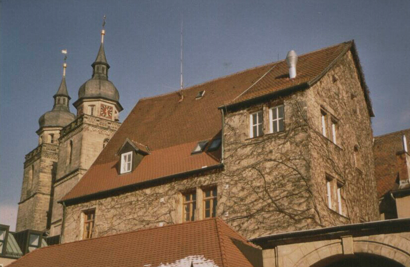 Nanckenreuther Burggut, links davon die Stadtkirchentürme in Bayreuth